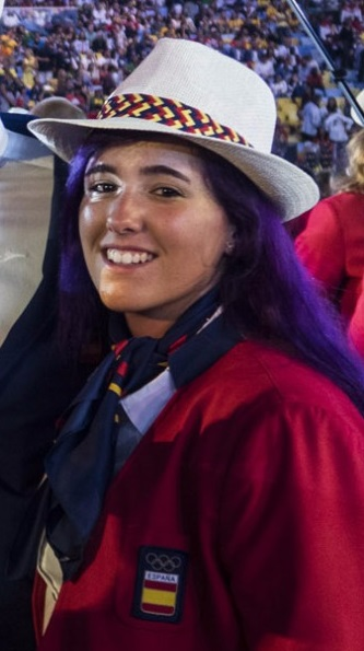 Adriana Martín, ceremonia de inauguración de los JJOO de Río 2016